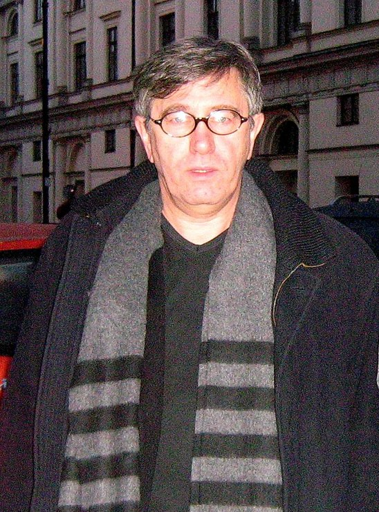 Jerzy Radziwiłowicz (ur. 8 września 1950 w Warszawie) - polski aktor teatralny i filmowy.